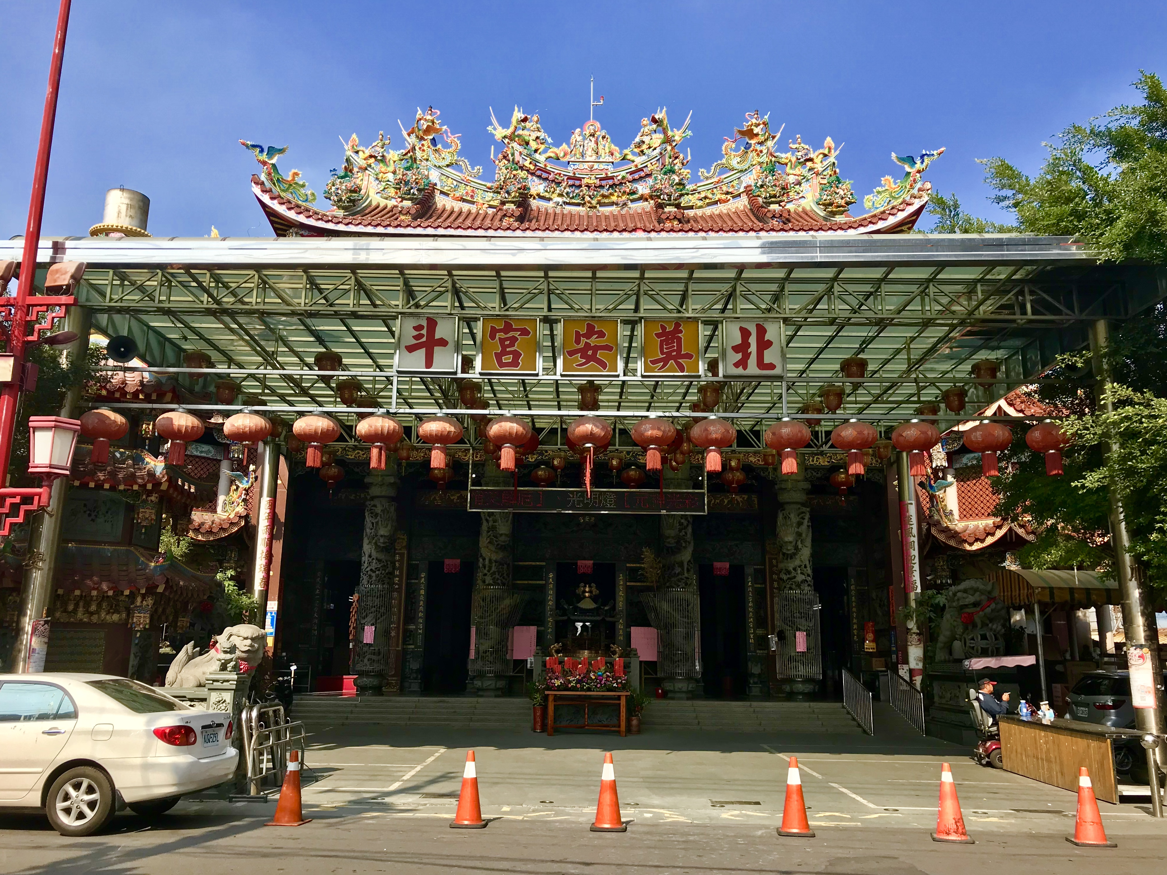 北斗奠安宮新前殿